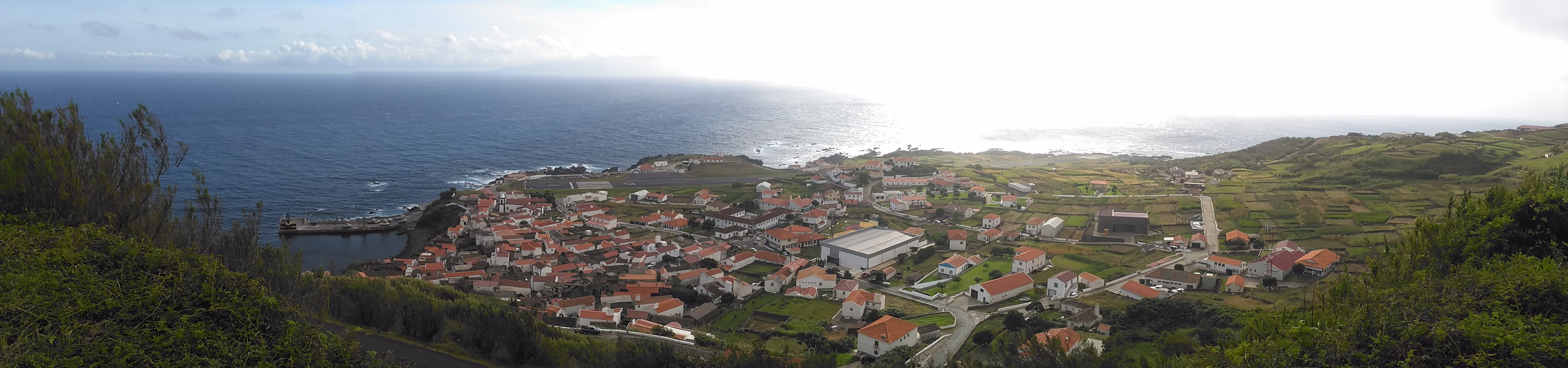 Vila do Corvo (vista panorâmica), ilha do Corvo, Região Autónoma dos Açores, Portugal.